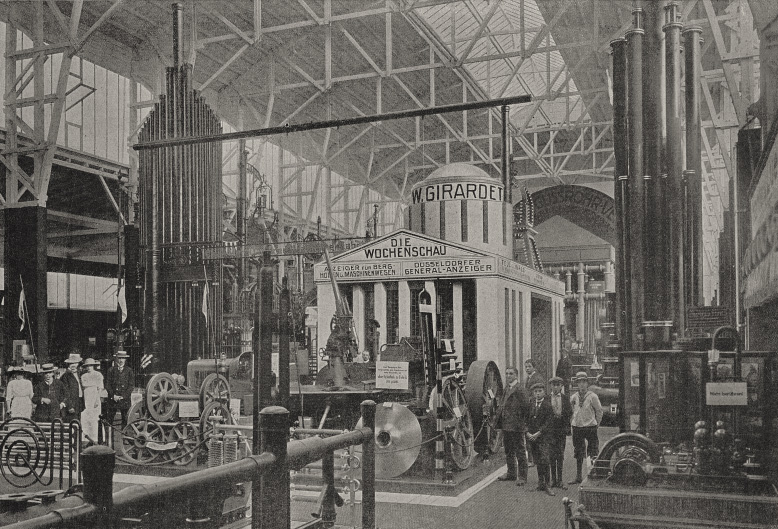 Städteausstellung Düsseldorf 1912. Industriehalle, in der Mitte der Pavillon des Verlages Wilhelm Giradet, Düsseldorfer General-Anzeiger